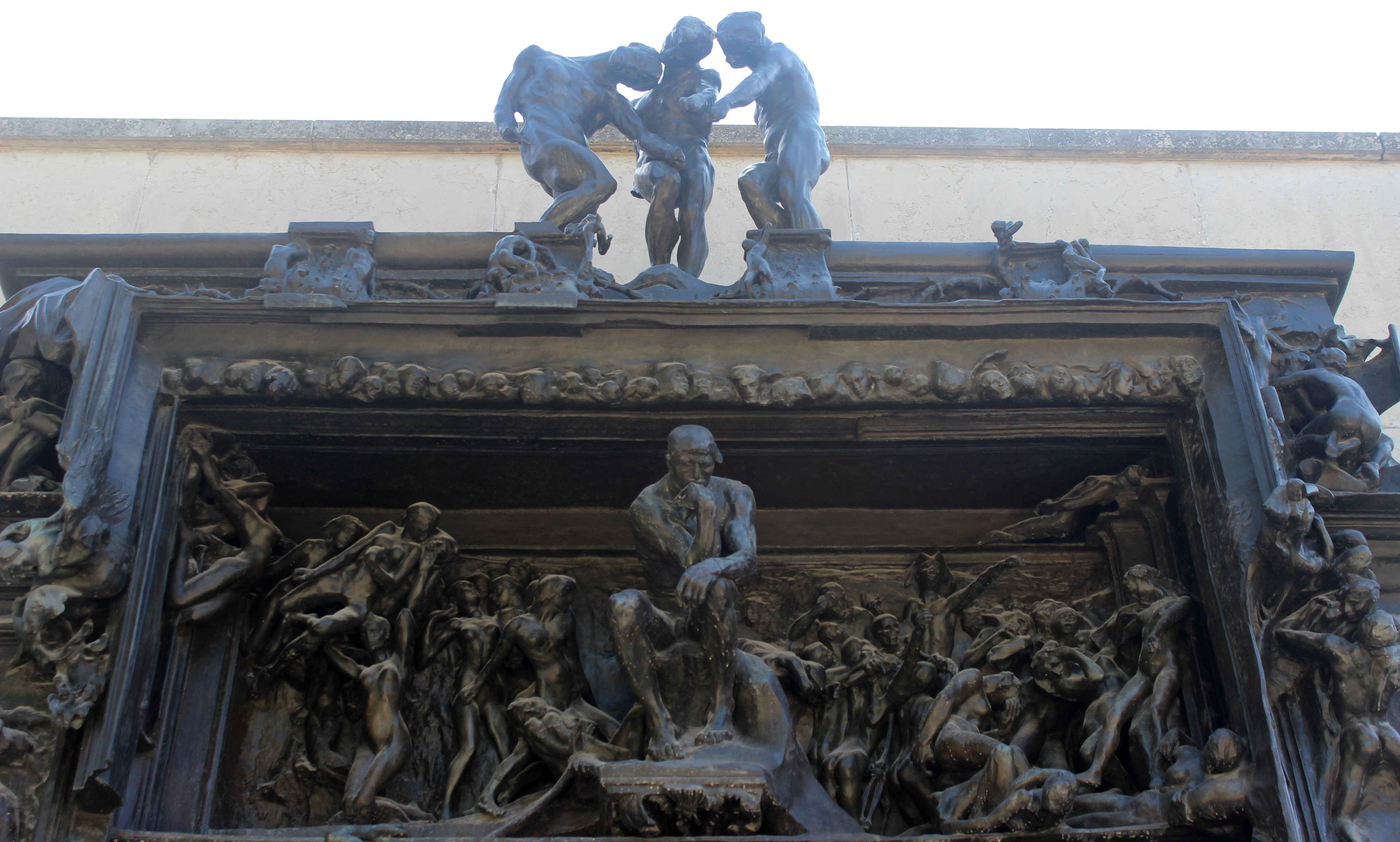 París, Musée Rodin. Porte de l'Enfer.